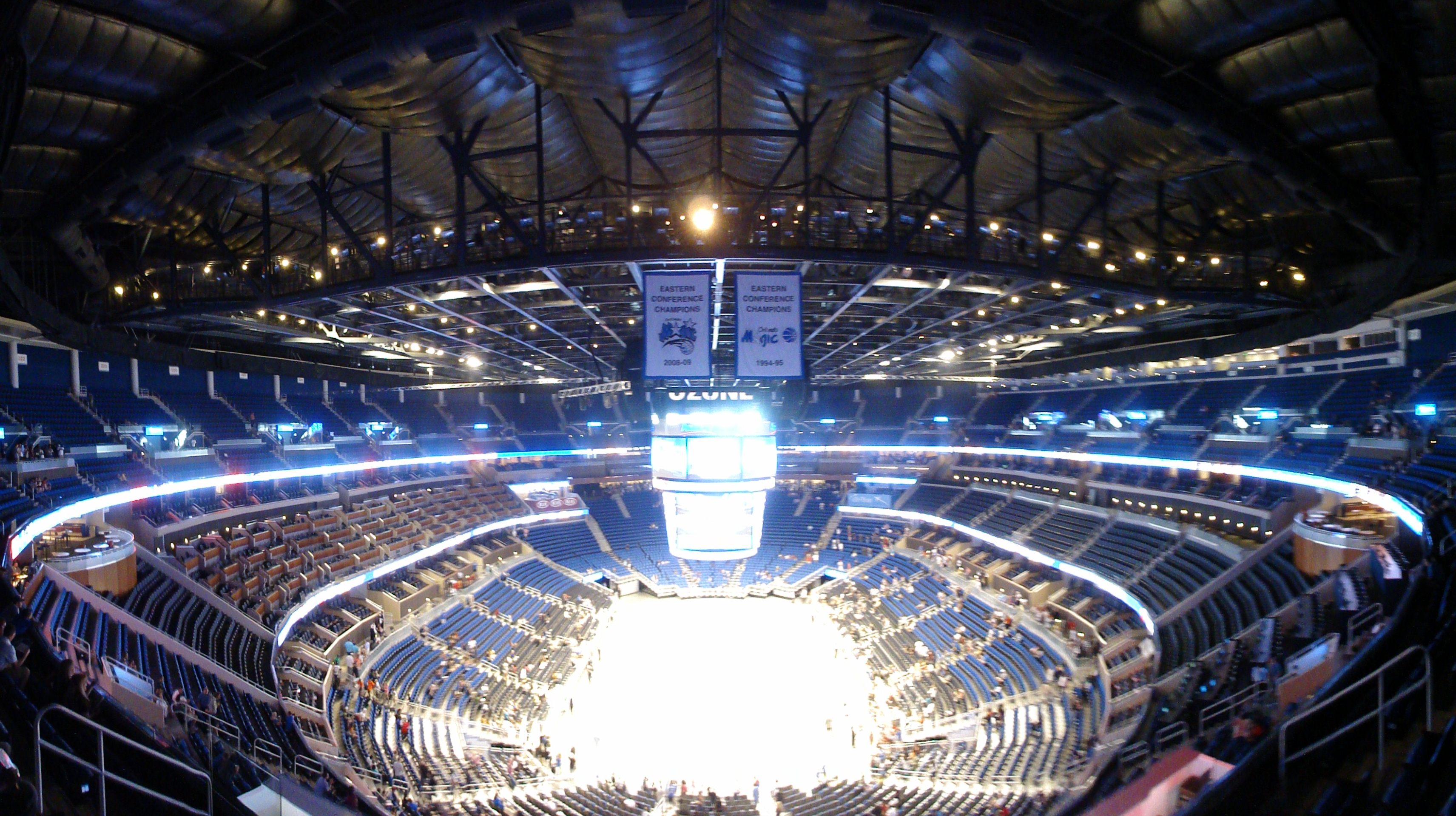 2010/10/02 at Amway CENTER.